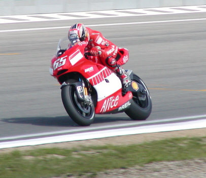 Loris Capirossi, GP Brno 2006